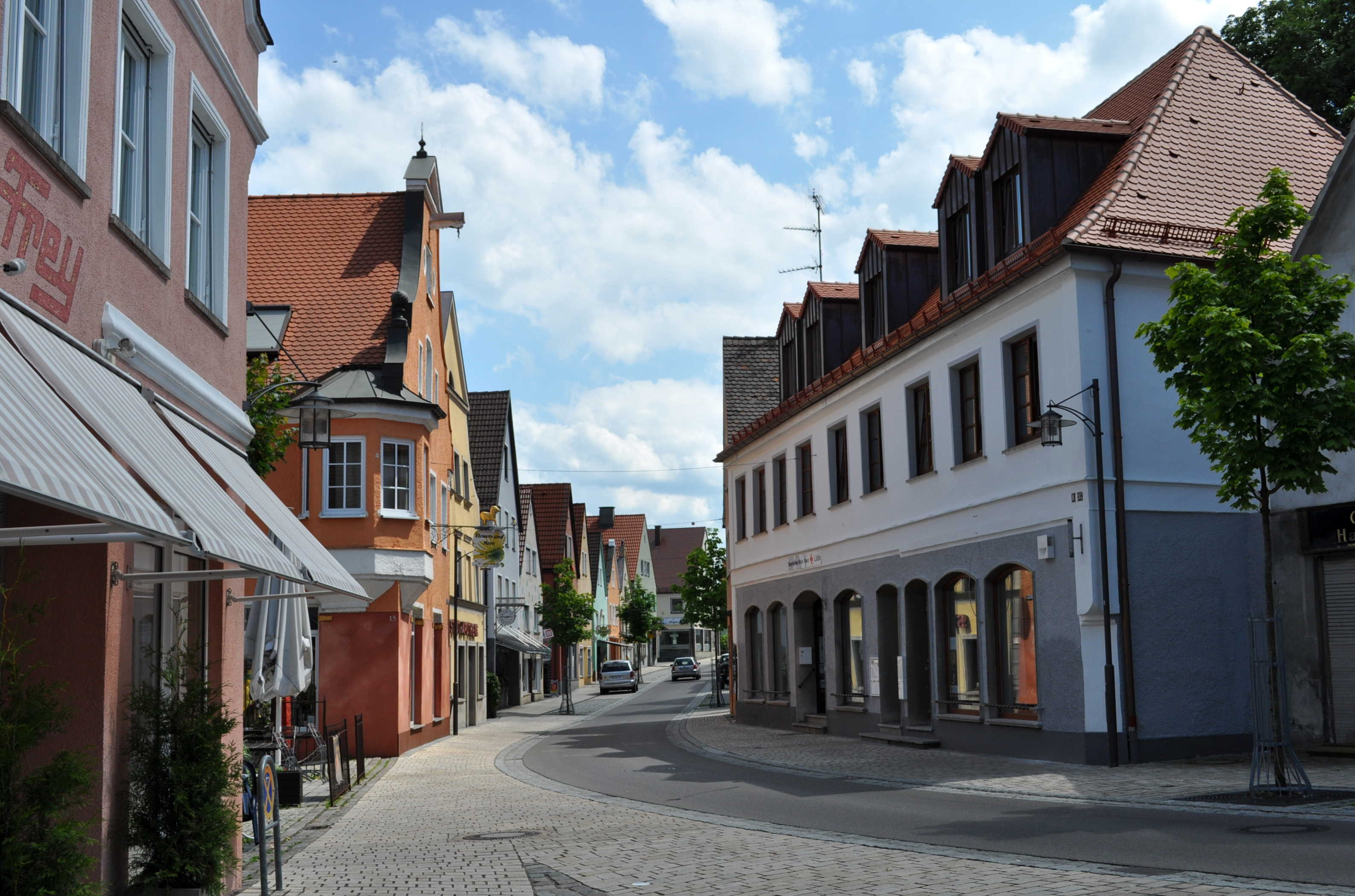 Stadtstraße in Burgau im Landkreis Günzburg (Bayern)